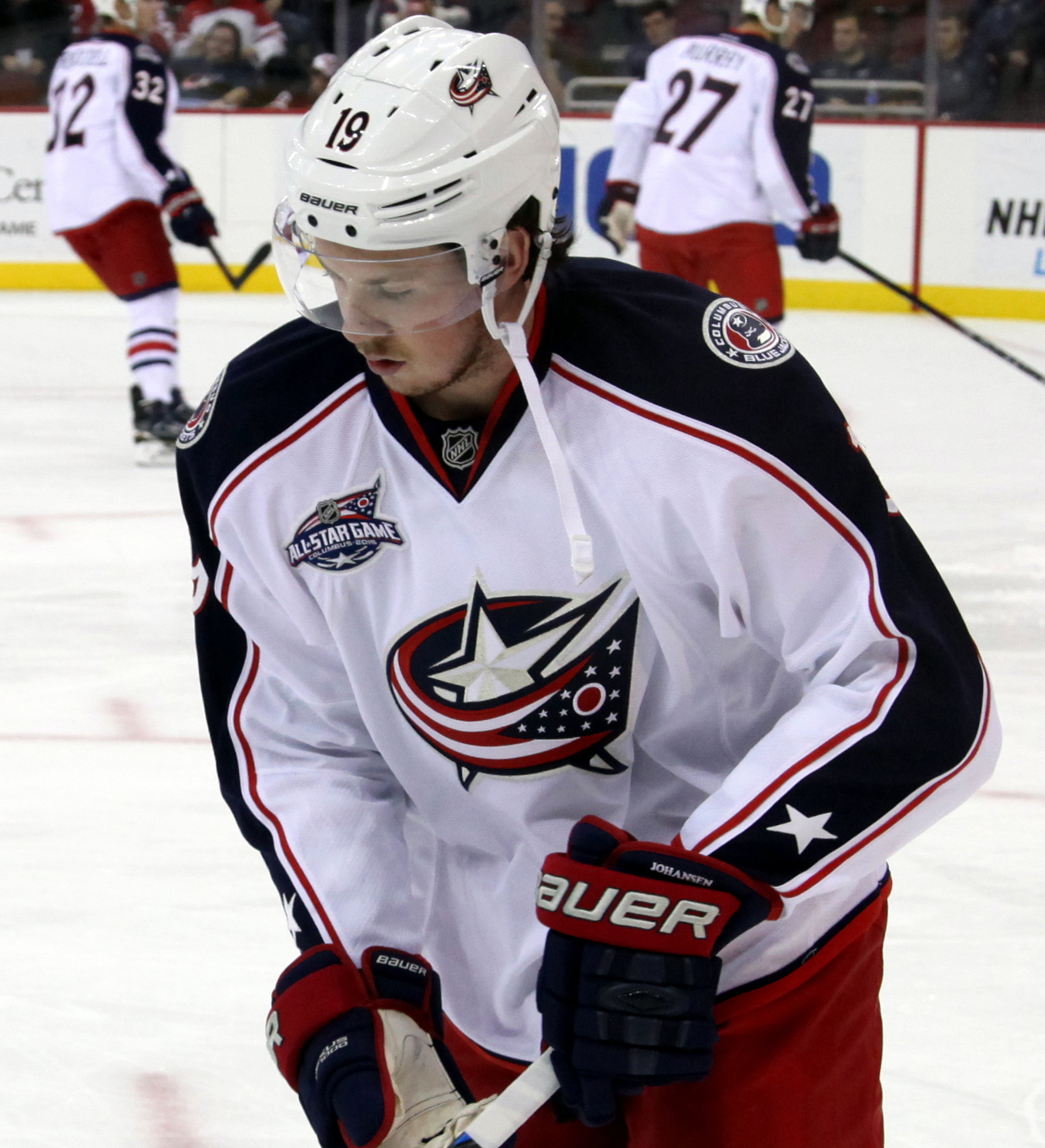 Ryan Johansen in November 2014